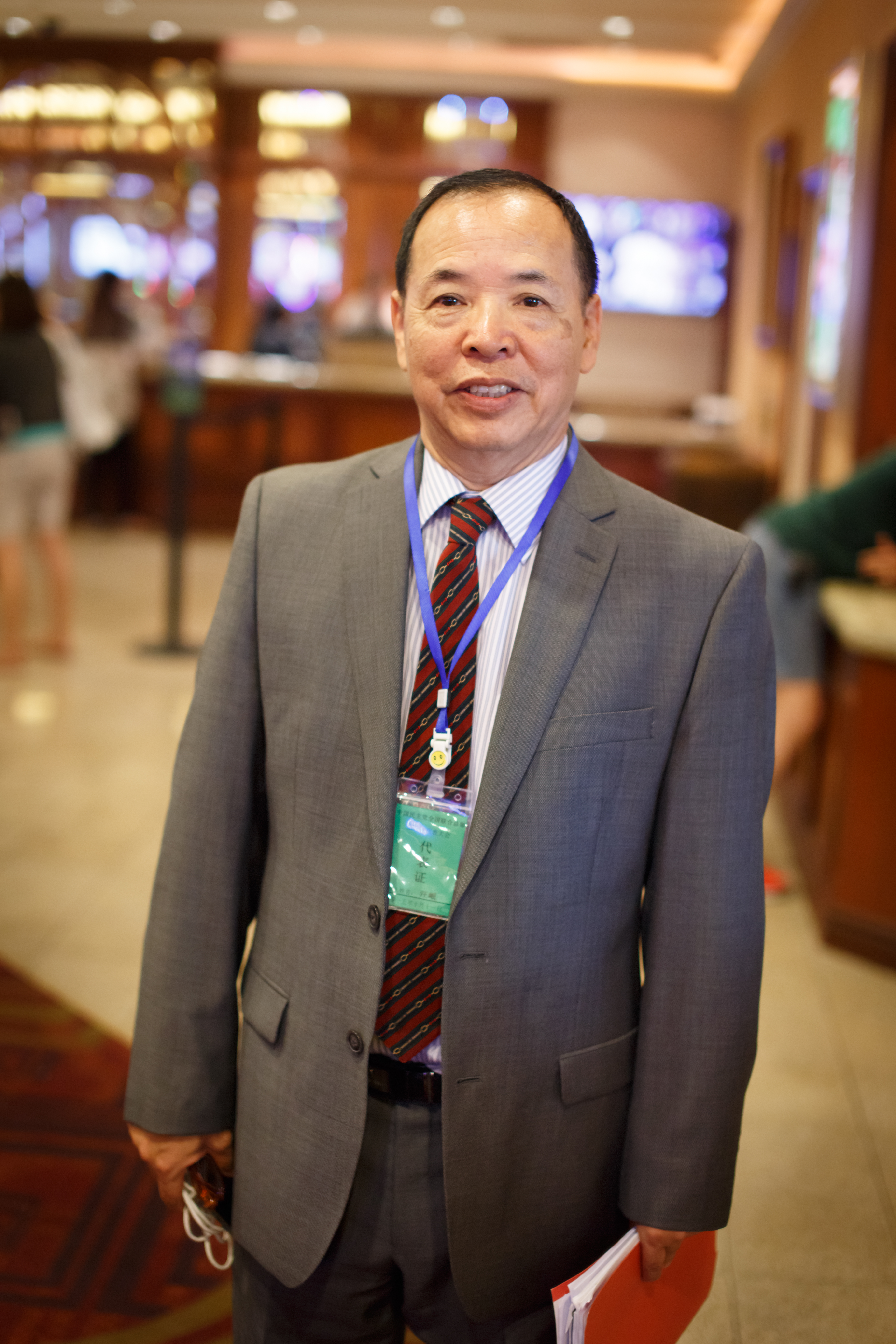 中文（中国大陆）: 汪岷2015年照片